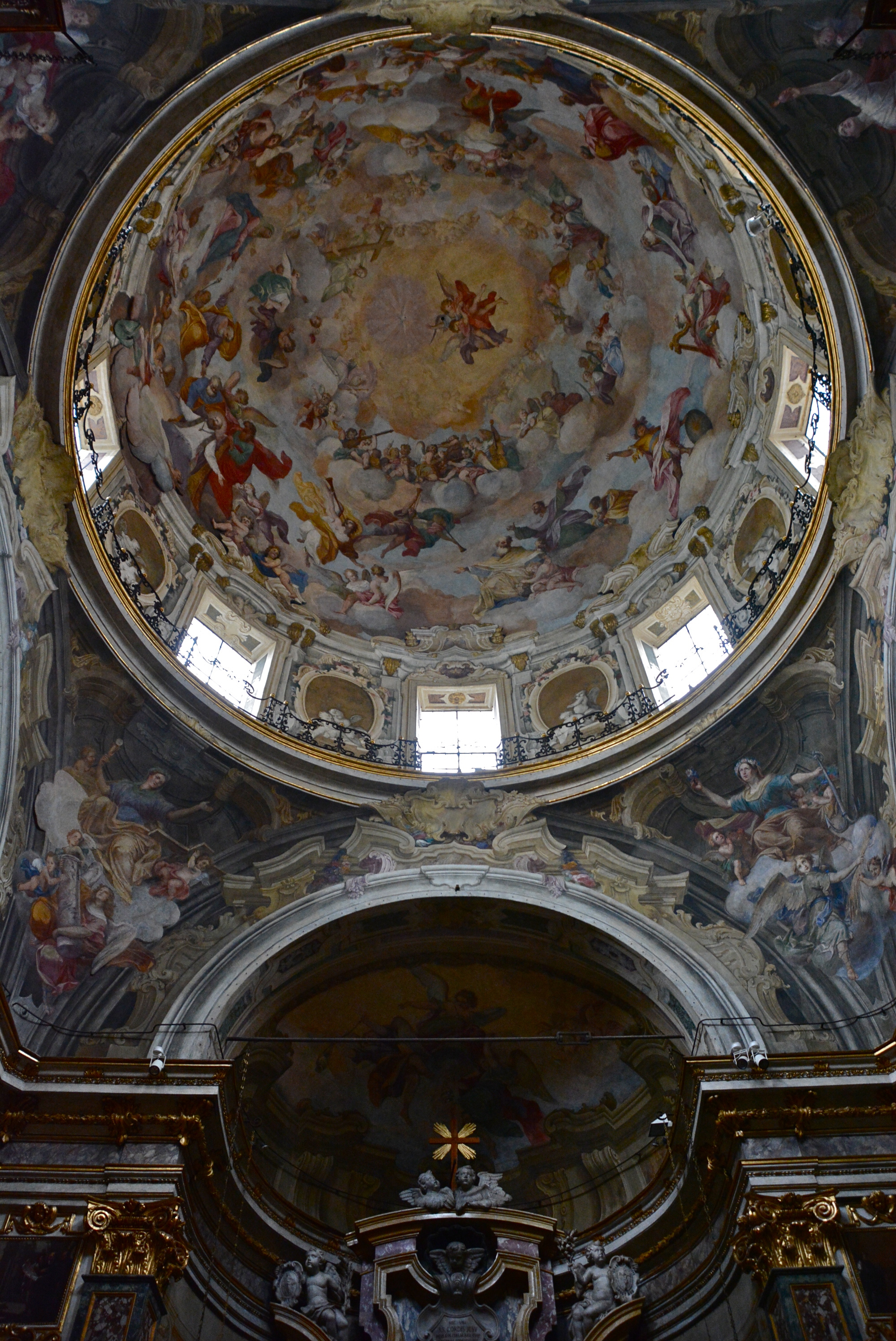 Chiesa della visitazione